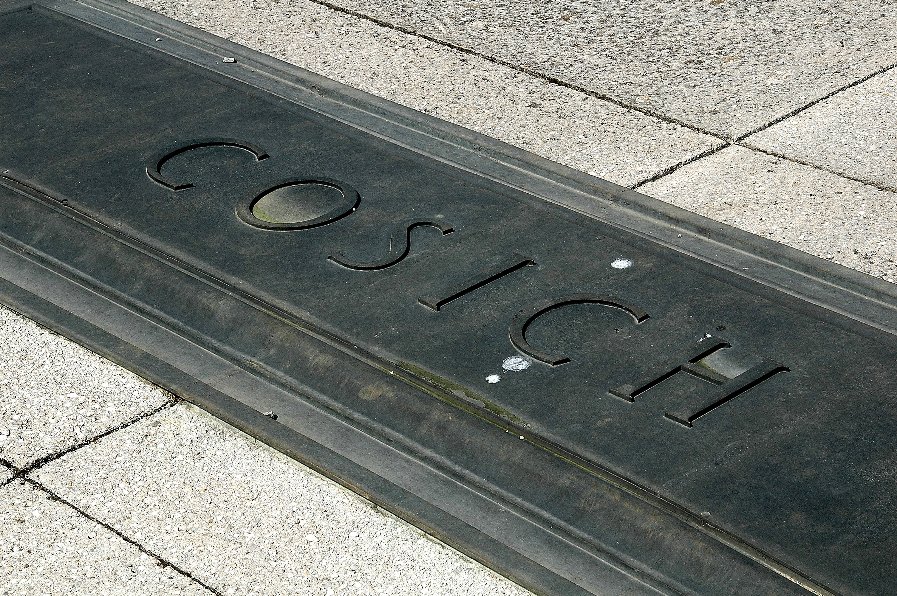 "COSICH", einer der Kampfplätze, auf 38 Bronzetafeln in Redipuglia